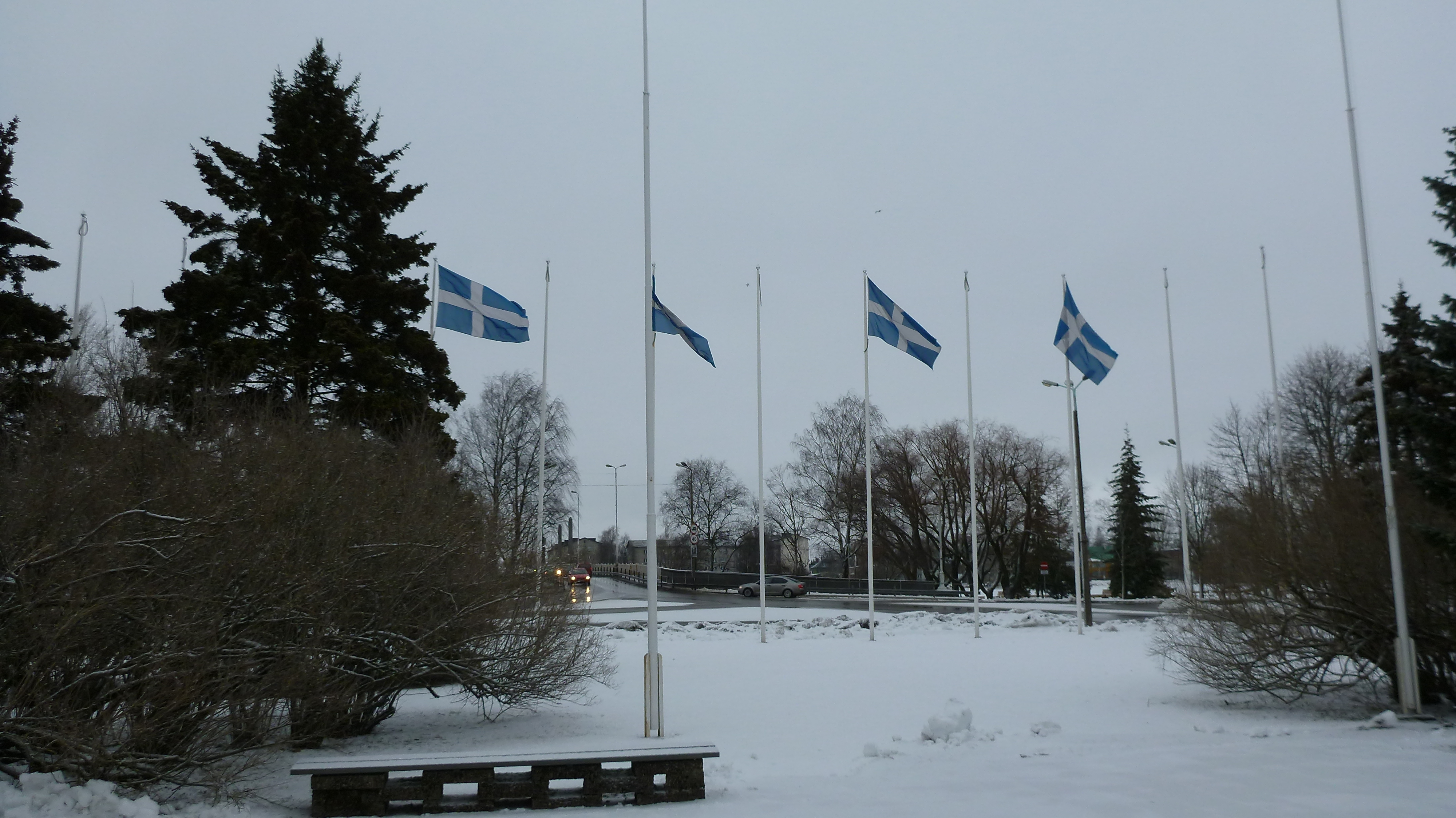 Pärnun lippuja